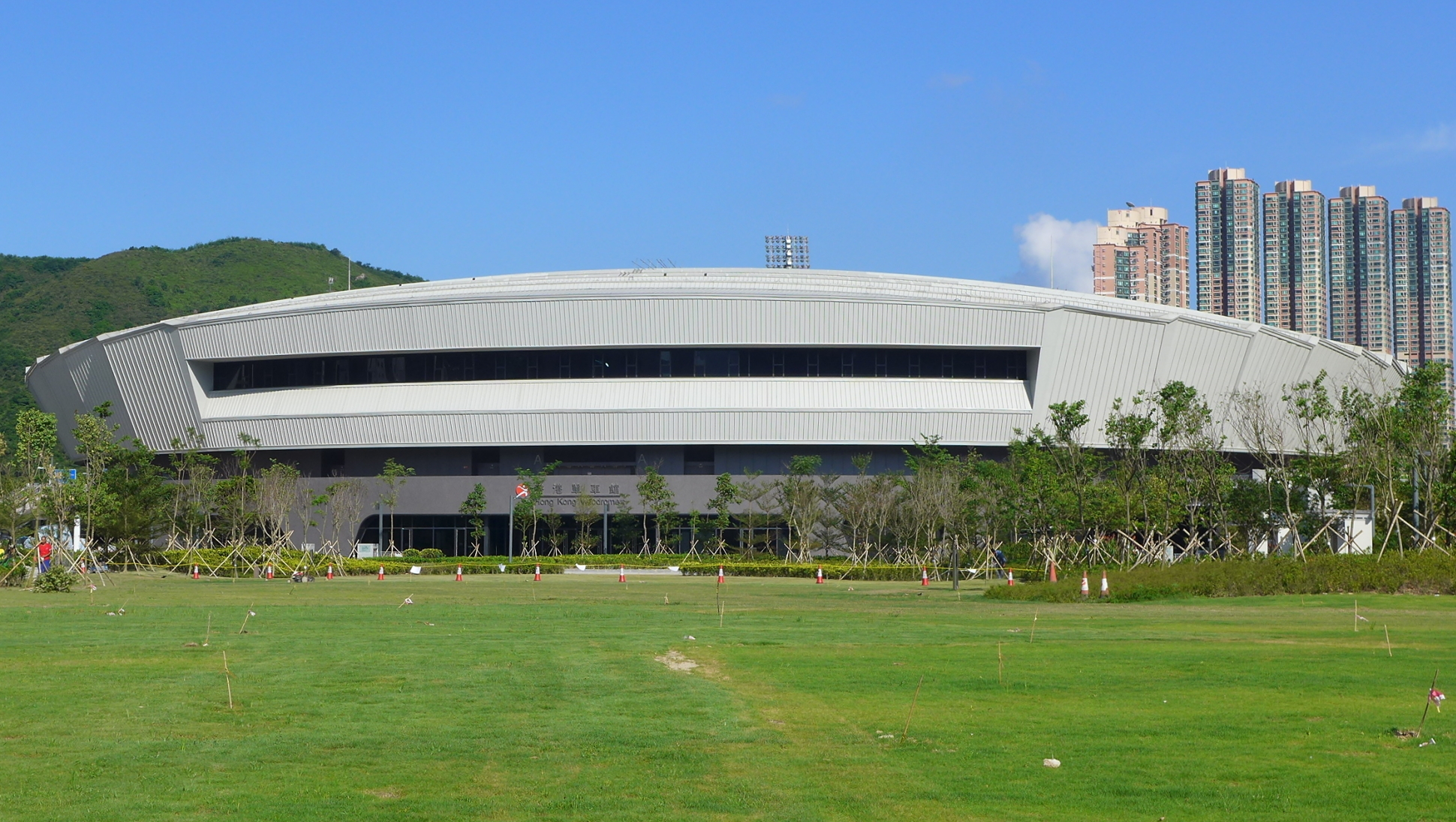 香港單車館 Hong Kong Velodrome